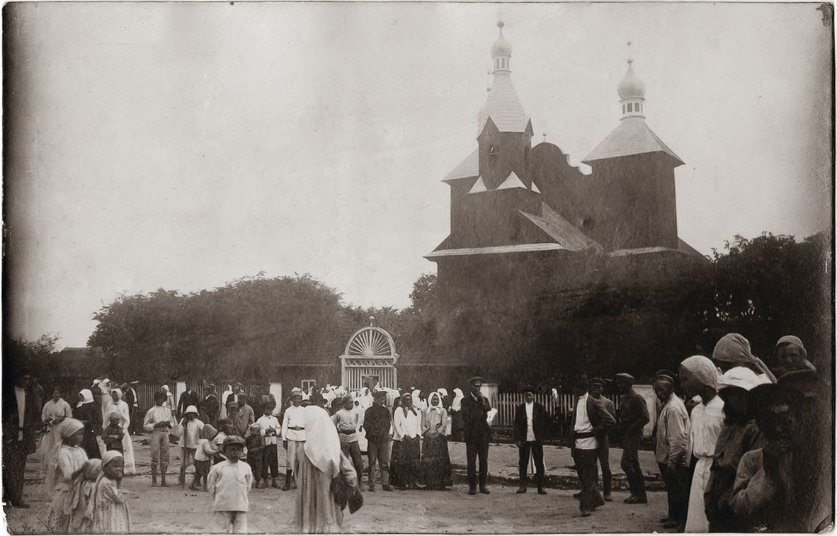 Беларуская (тарашкевіца): Бачэйкаў (Bačejkaŭ), пляц Рынак (plac Rynak). Царква